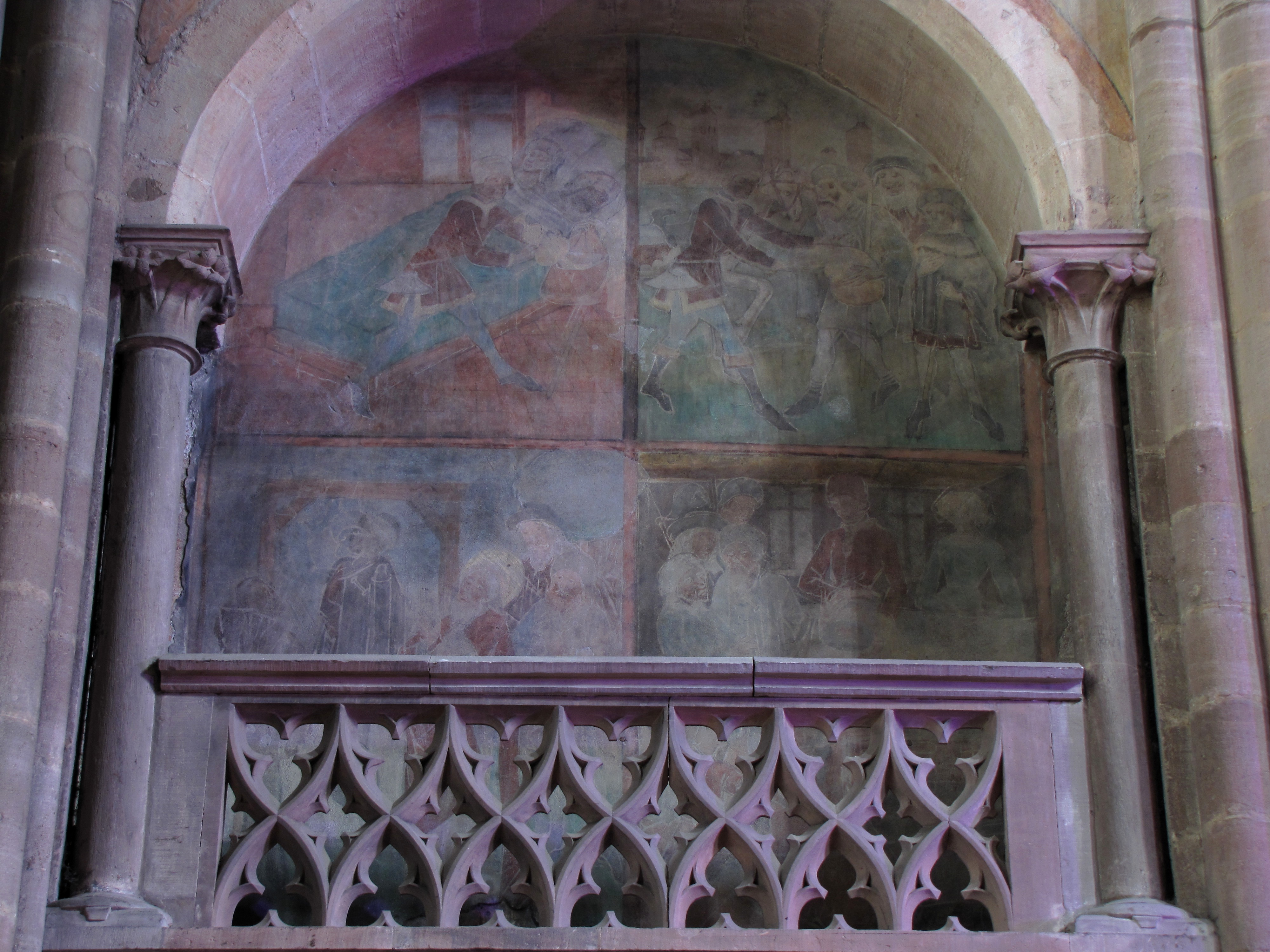 Alsace, Bas-Rhin, Sélestat, Église Saint-Georges (PA00084978, IA00124588). Peinture monumentale "Miracle de St-Jacques le Majeur" (XVe)